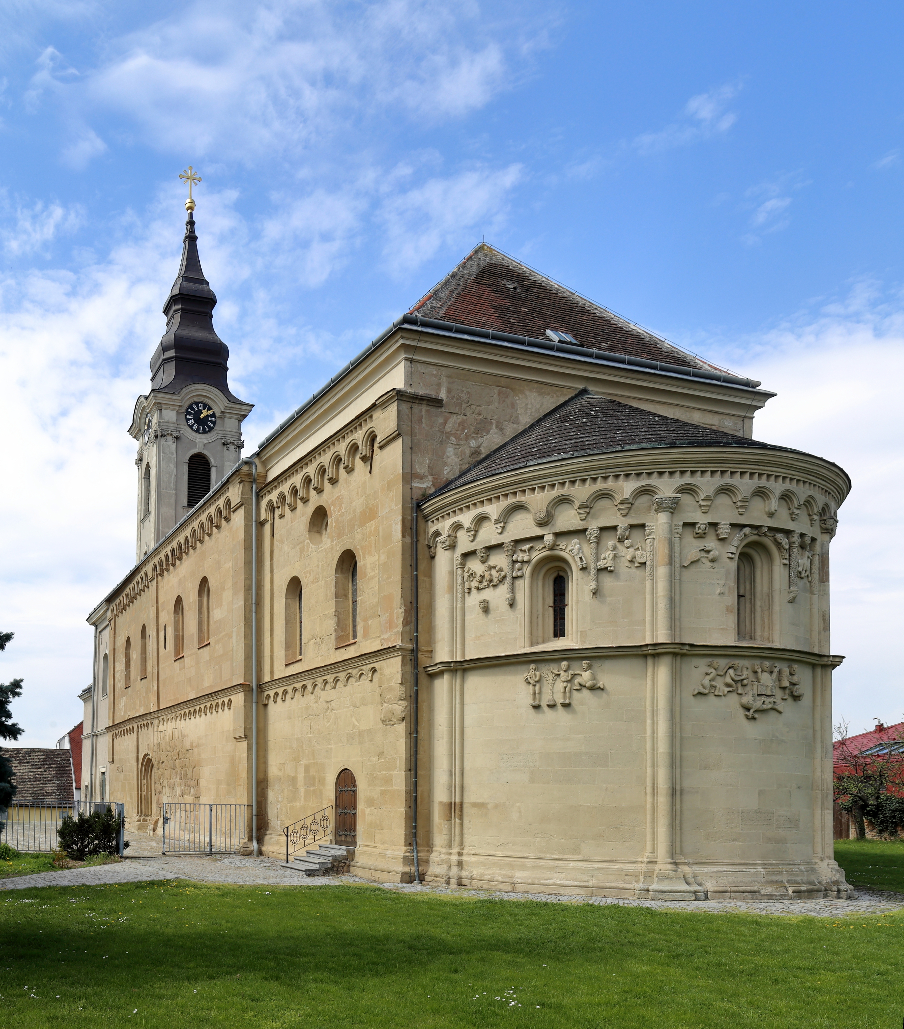 Südostansicht der römisch-katholischen Pfarrkirche Mariae Geburt in Schöngrabern, ein Ortsteil der niederösterreichischen Marktgemeinde Grabern.Das Langhaus, das leicht eingezogene Chorquadrat und die Rundapsis sind spätromanisch (um 1210/30). Ende des 18. Jahrhunderts wurde der Turm über dem Chorquadrat abgetragen und Anfang des 19. Jahrhunderts das Langhaus um ein Joch verlängert sowie der Westturm errichtet. Nach einem Brand wurde der Turm 1866 erhöht.